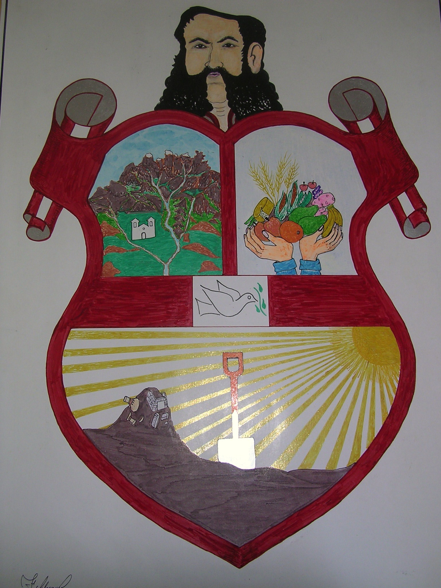 Escudo original del distrito Cáceres del Perú, Jimbe, tal como lo presentó el ganador del concurso el 13 de octubre de 2006.